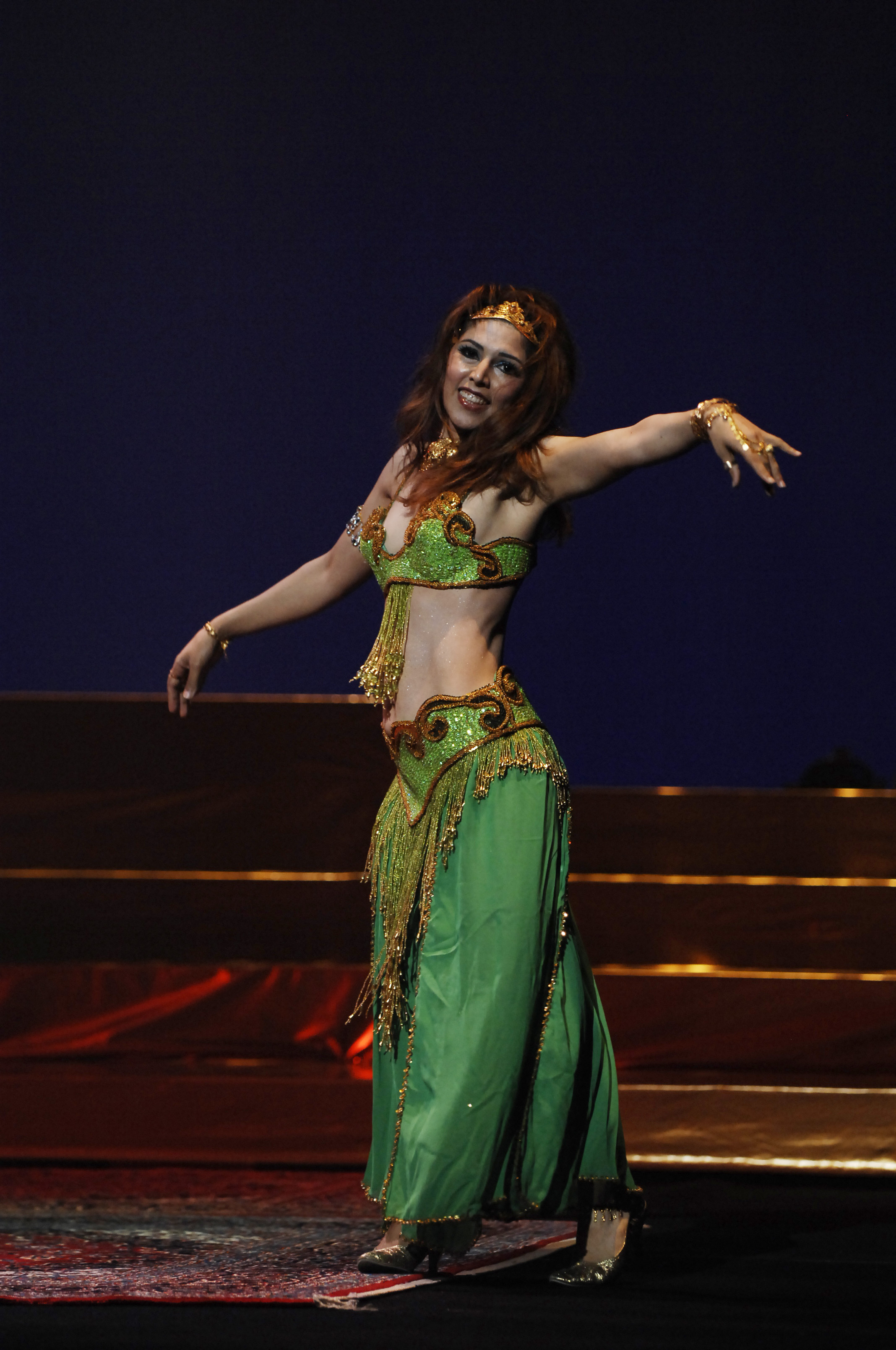 キミヤ・サレー2008年9月ステージショー